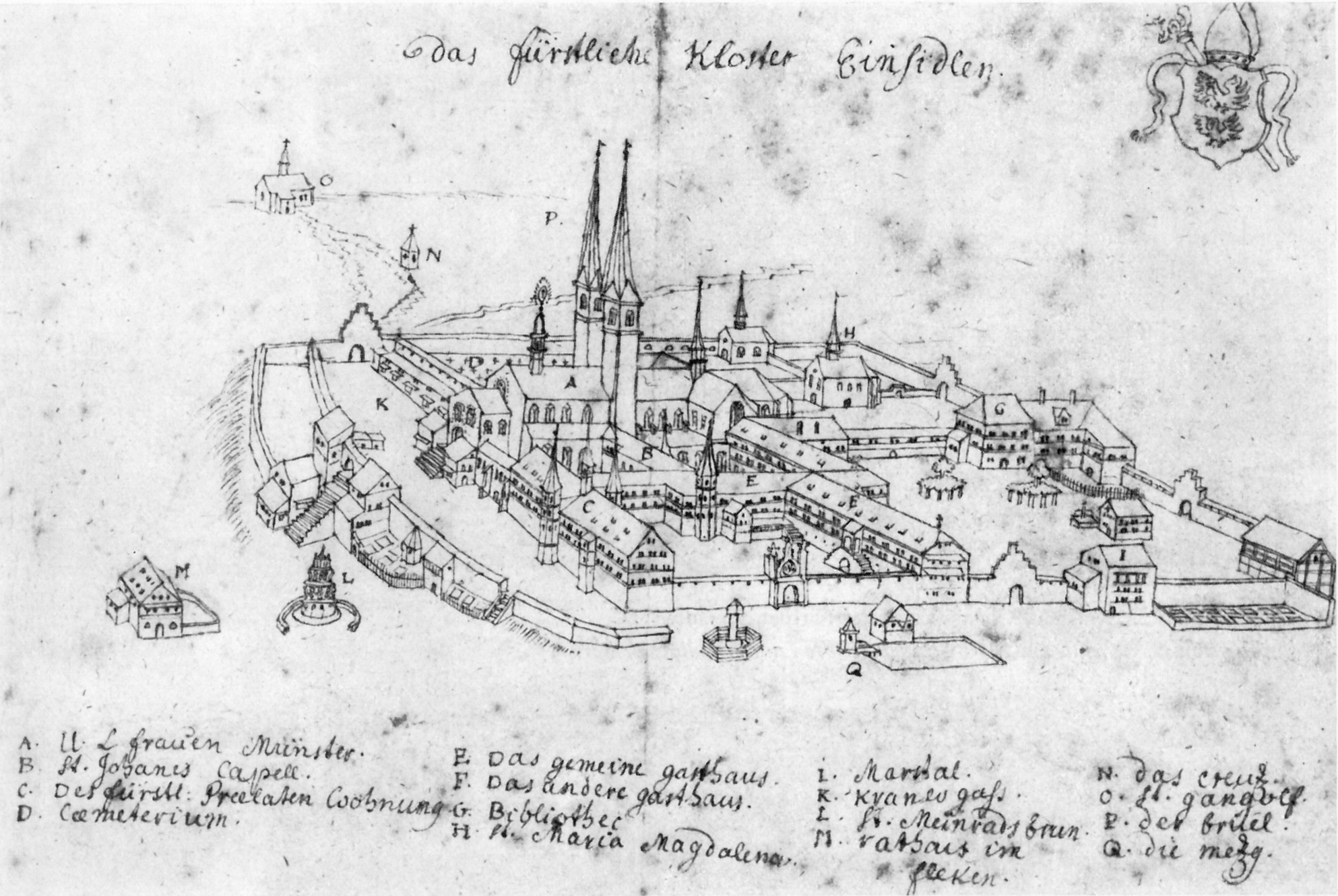 «Das fürstliche Kloster Einsidlen». Federzeichnung um 1735. Graphische Sammlung der ETH Zürich